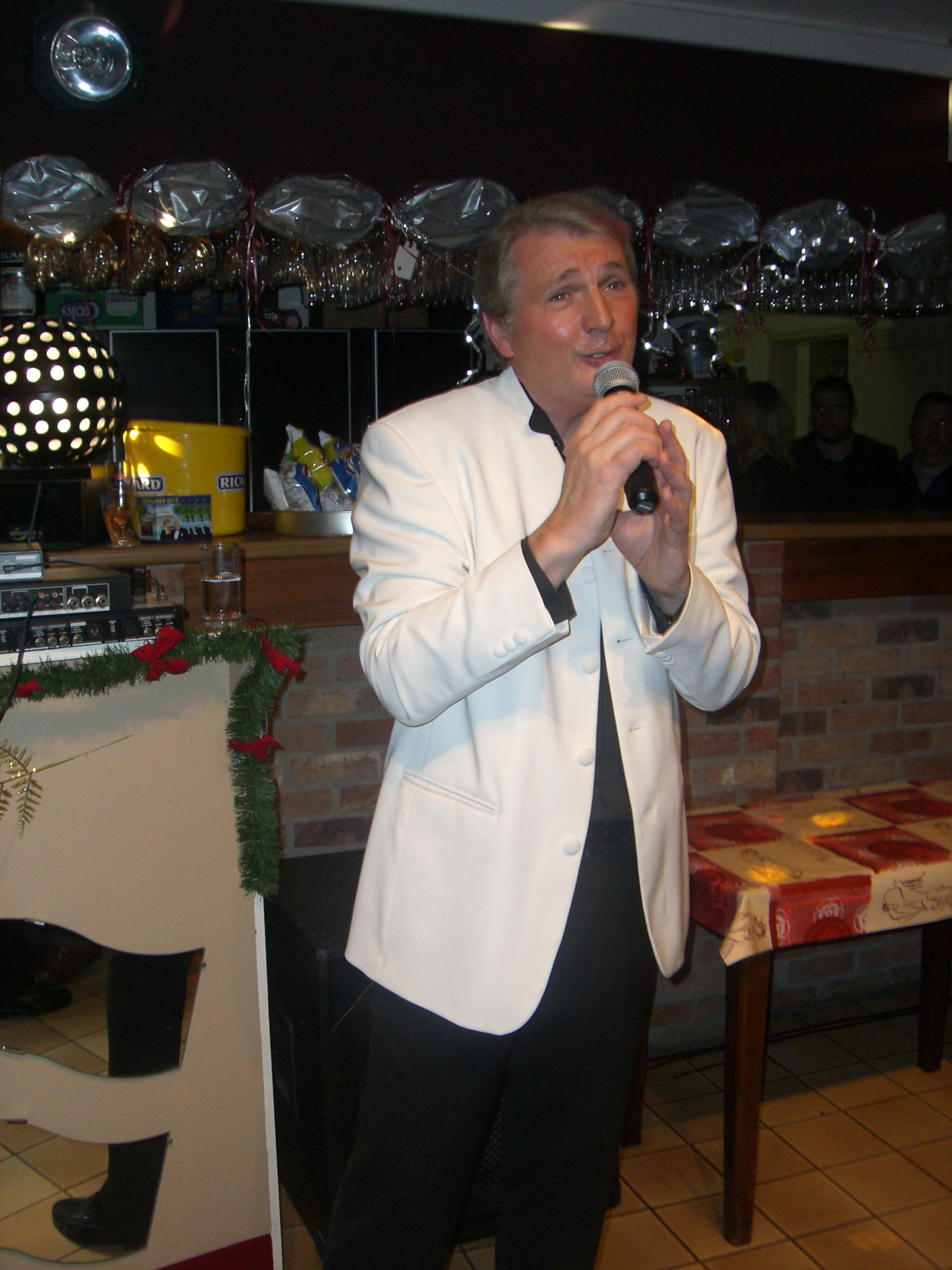 Christian Vidal en prestation chez Manu en Belgique